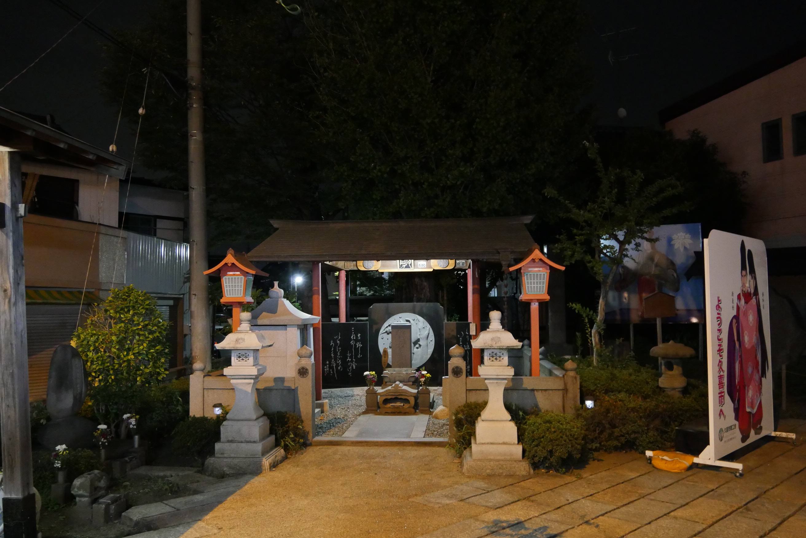 静御前の墓（埼玉県久喜市）